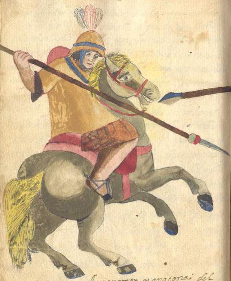 Anganamón o Anganamon, (Angka Nhamunh, mapudungún; "medio pie" o "en la mitad del pie") destacado jefe militar mapuche que ofreció enconada resistencia a los españoles comienzos del siglo XVII.